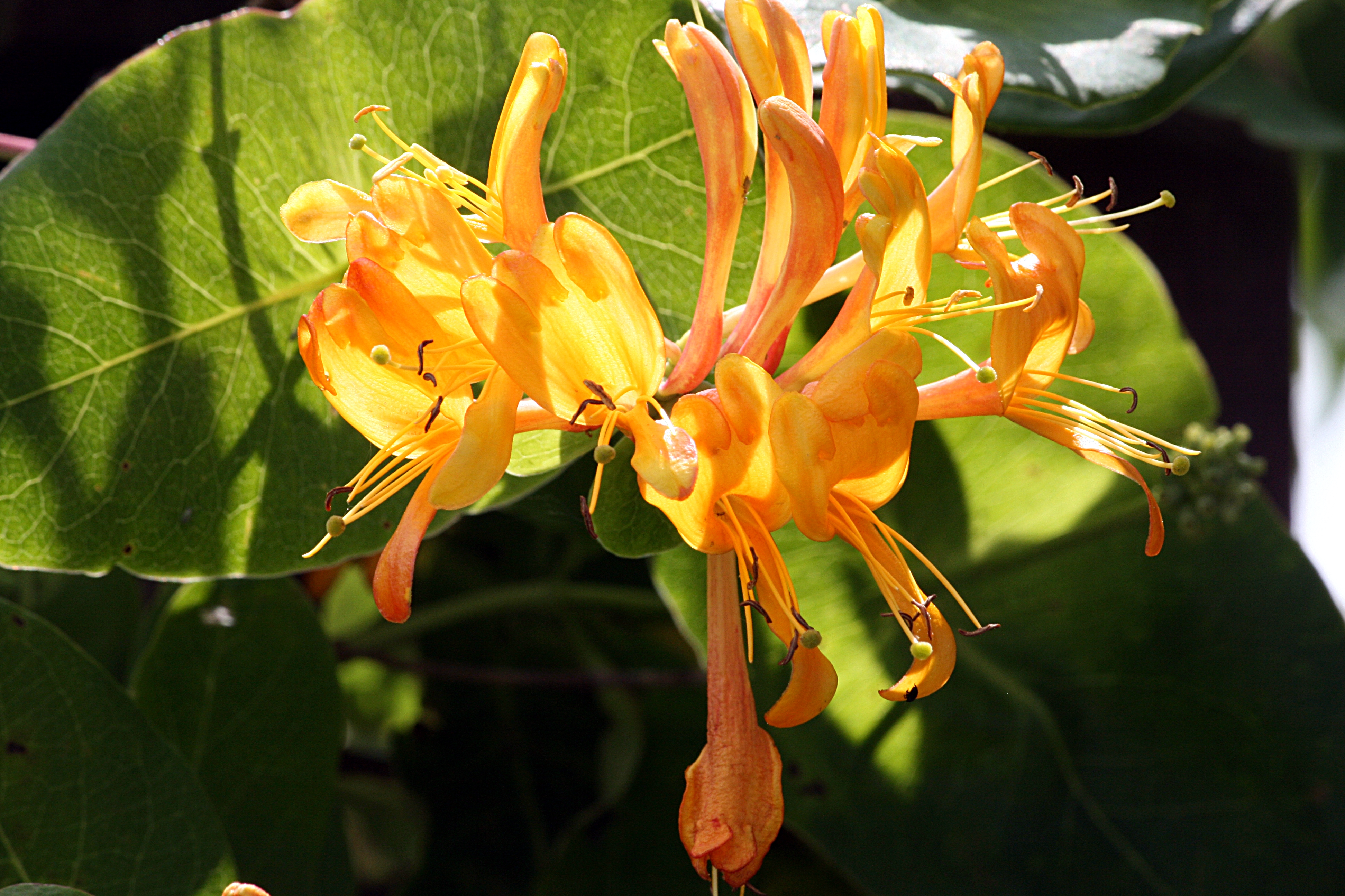 Lonicera spec. Jelängerjelieber,_Gartengeißblatt, Lonicera caprifolium